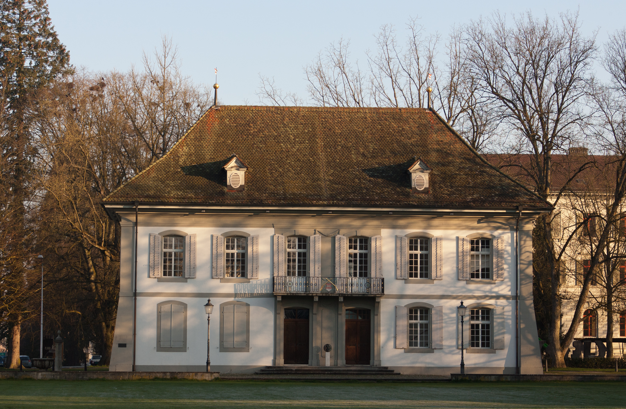 Ehemaliges Schützenhaus von Zofingen